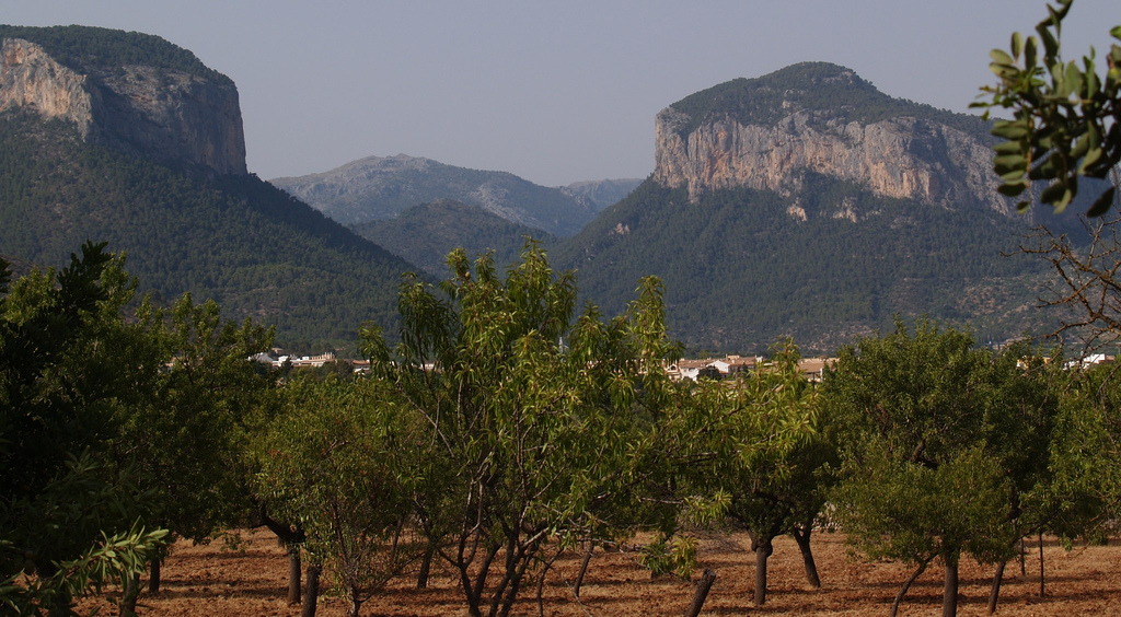 De siempre me han hipnotizado el Puig de Alaró y su gemela.